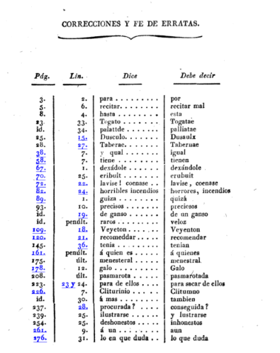 Fe de erratas